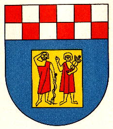 Wappen von Oberhambach